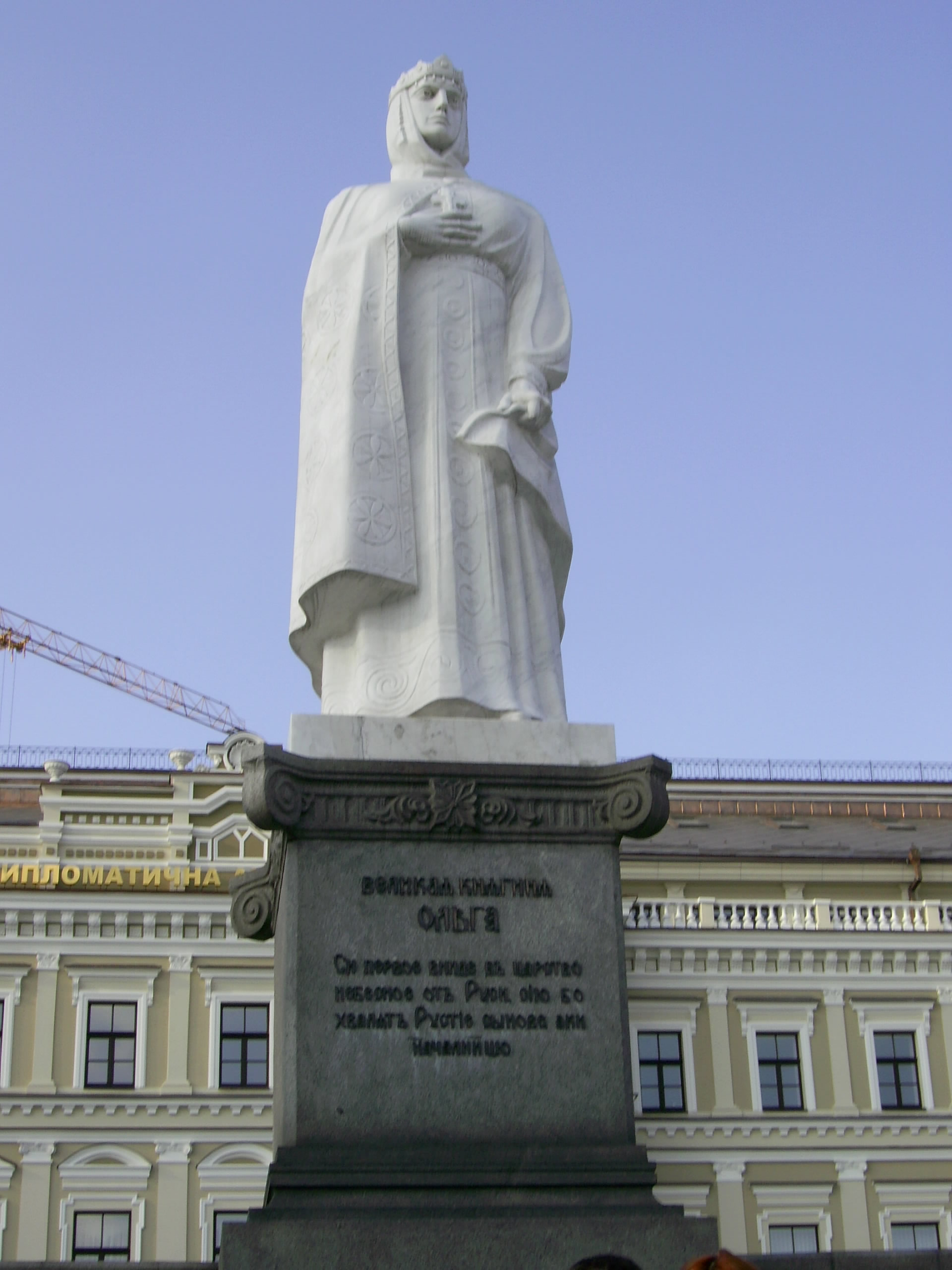 Пам'ятник княгині Ользі, святому апостолу Андрію Первозваному та просвітителям Кирилу і Мефодію